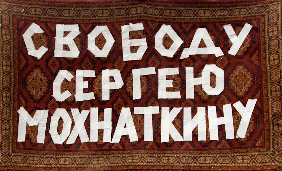 Фото с пикета в поддержку Мохнаткина в Новосибирске, август 2010 года.